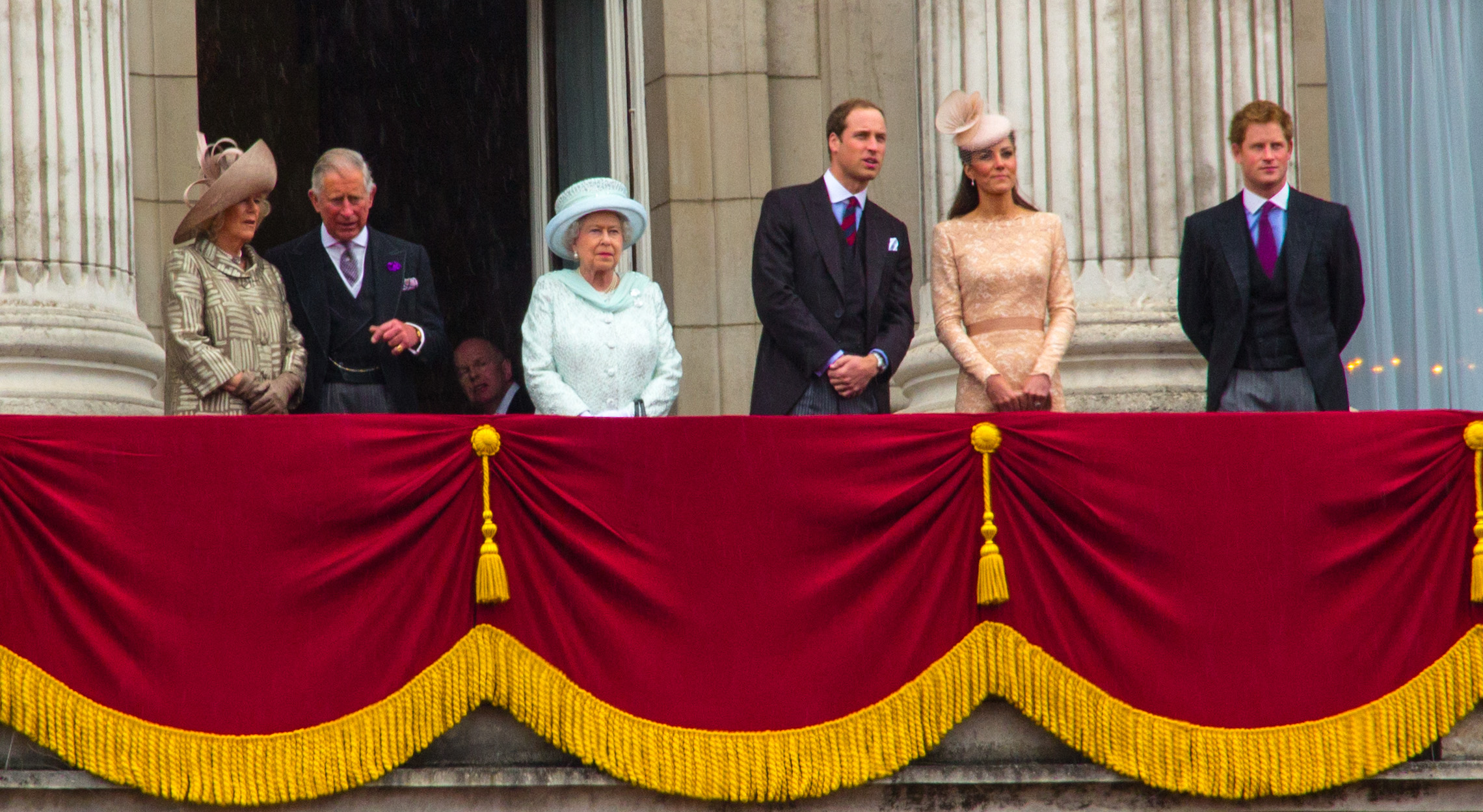 Hello England